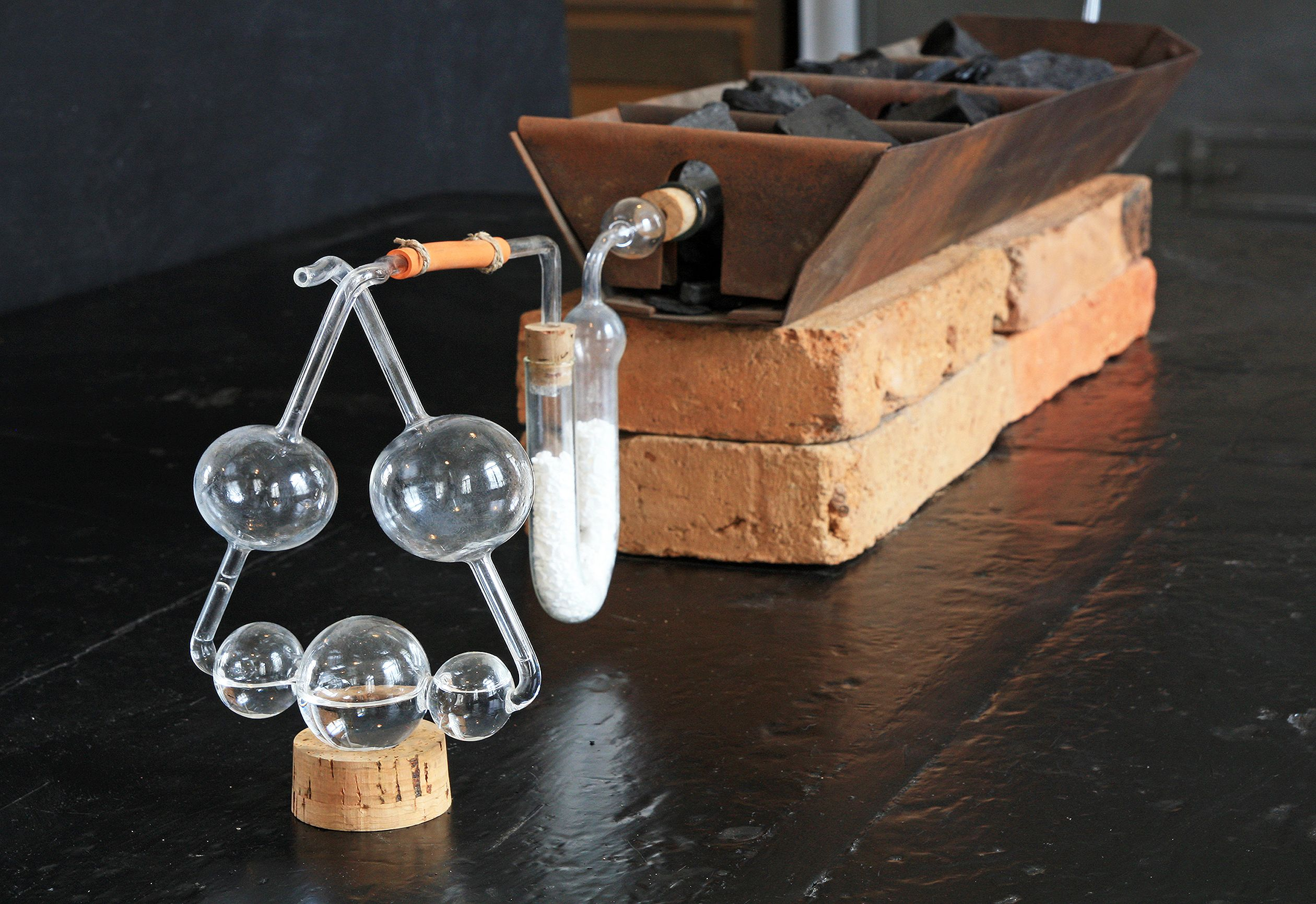 Der Fünfkugelapparat zur Elementaranalyse im Liebigmuseum Gießen